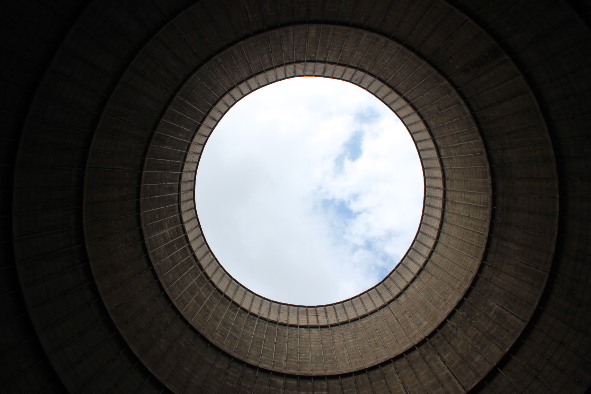 Centrale Monceau koeltoren Juli 2019